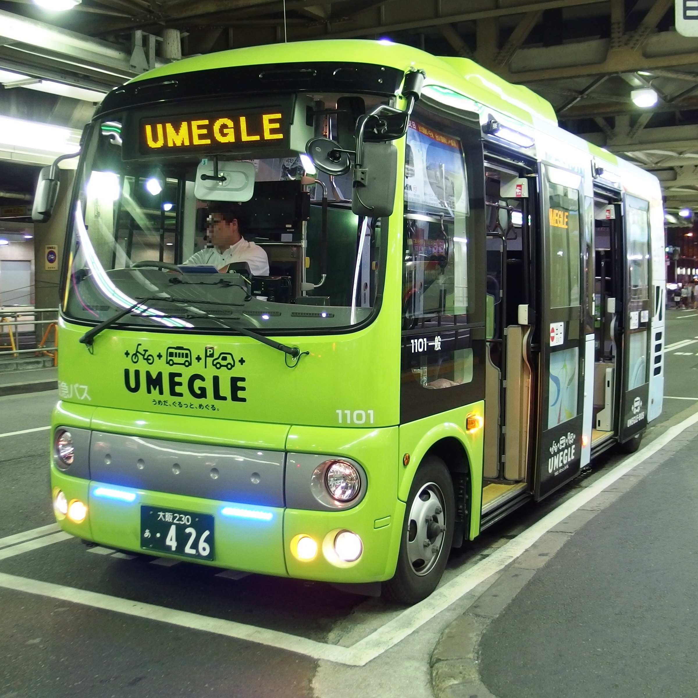 UMEGLE-Bus, 大阪府大阪市